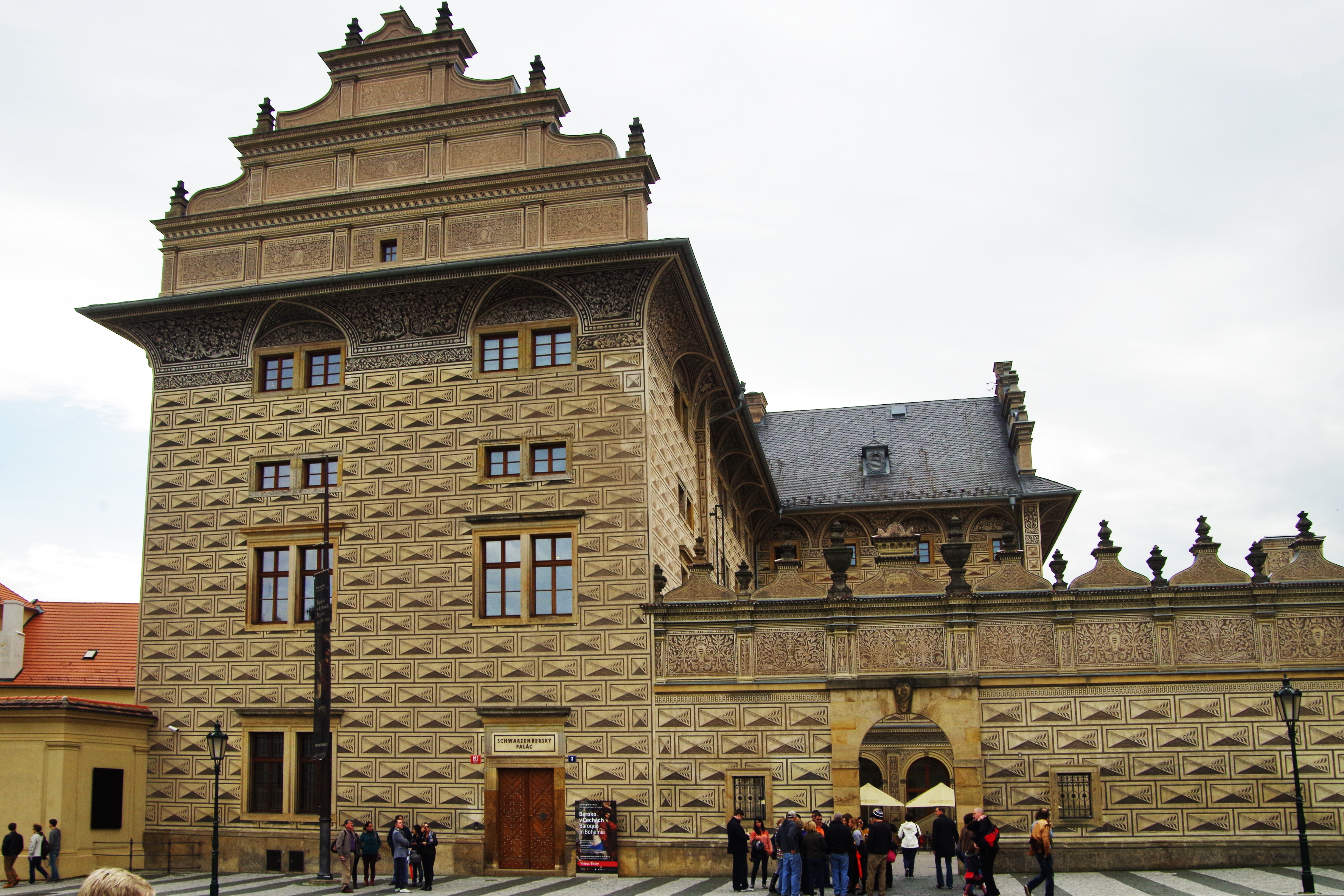 Schwarzenberg-Palast